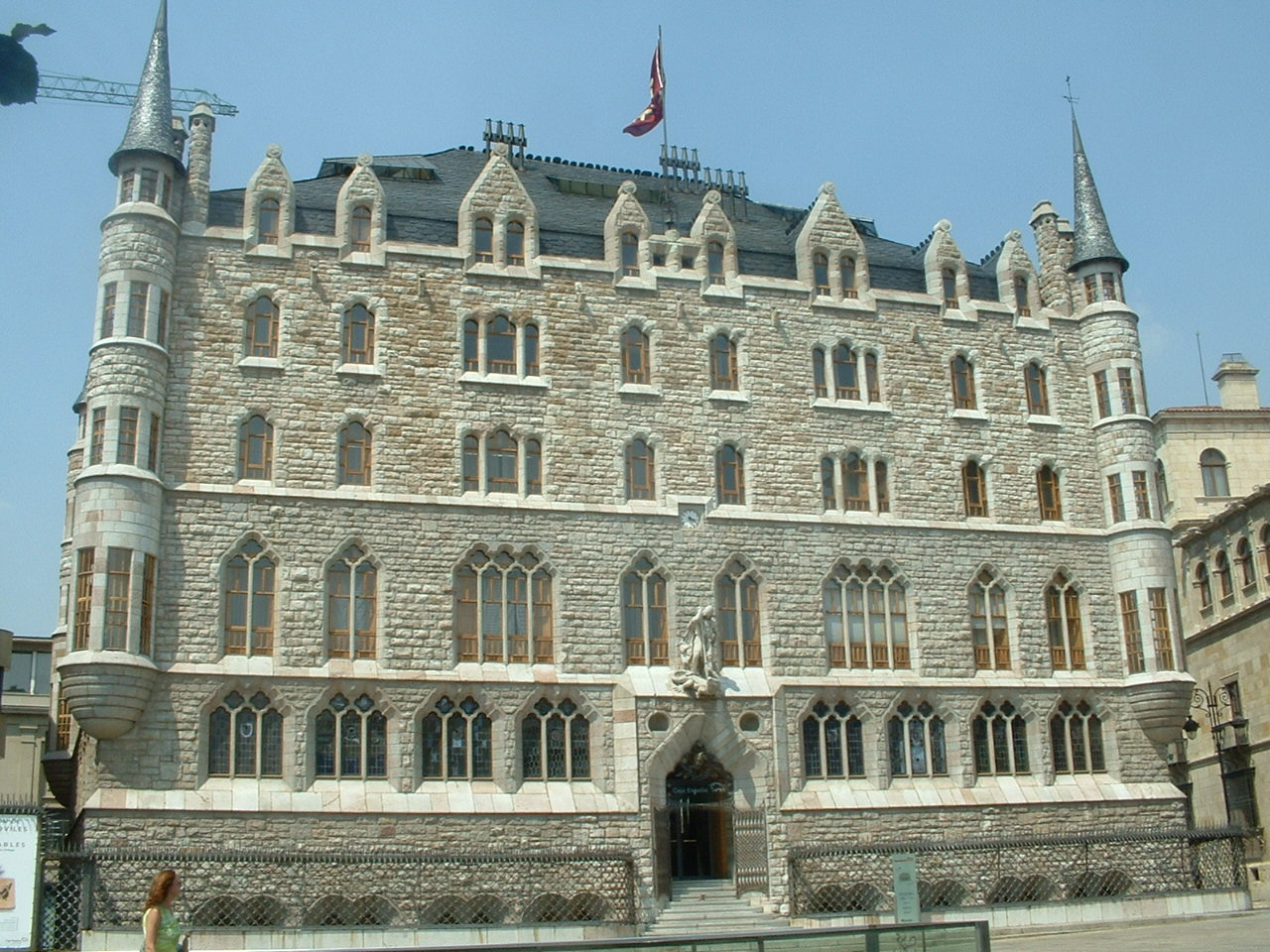 Casa Botines en León, España